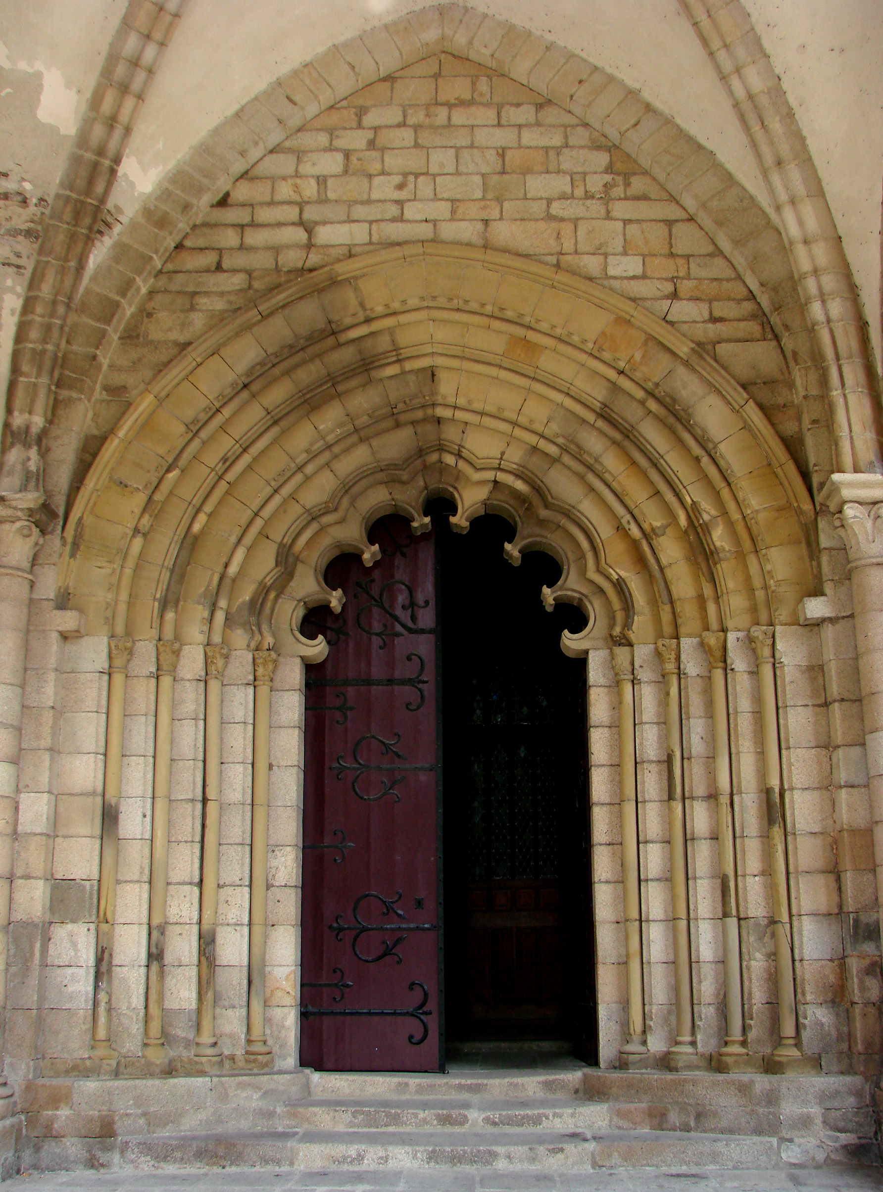 Cathédrale Notre-Dame de Tulle.XIIéme siècle.Le portail polylobé.